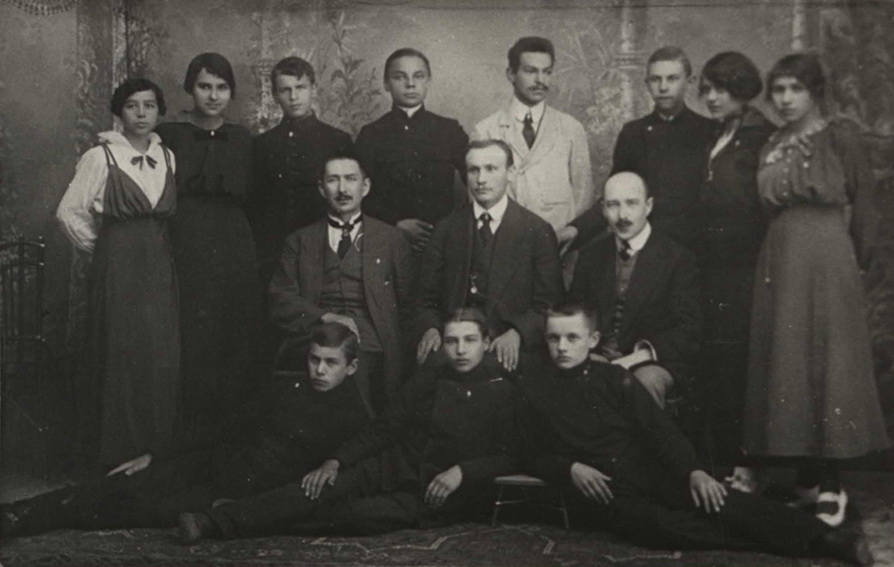 Віленскія беларускія настаўніцкія курсы. Сядзяць Іван Луцкевіч, Баляслаў Пачопка (кіраўнік курсаў) Антон Луцкевіч.